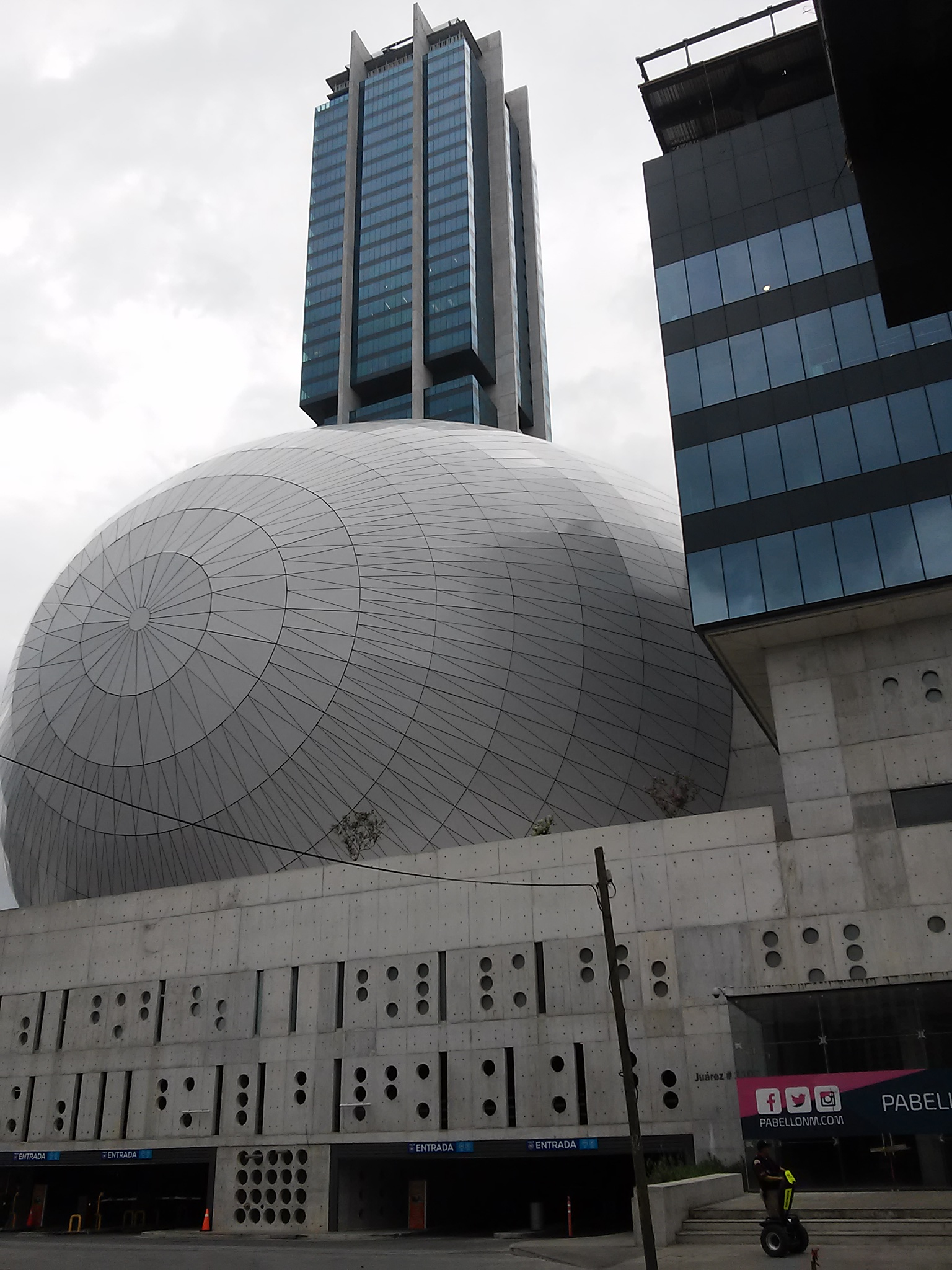 Centro de Monterrey